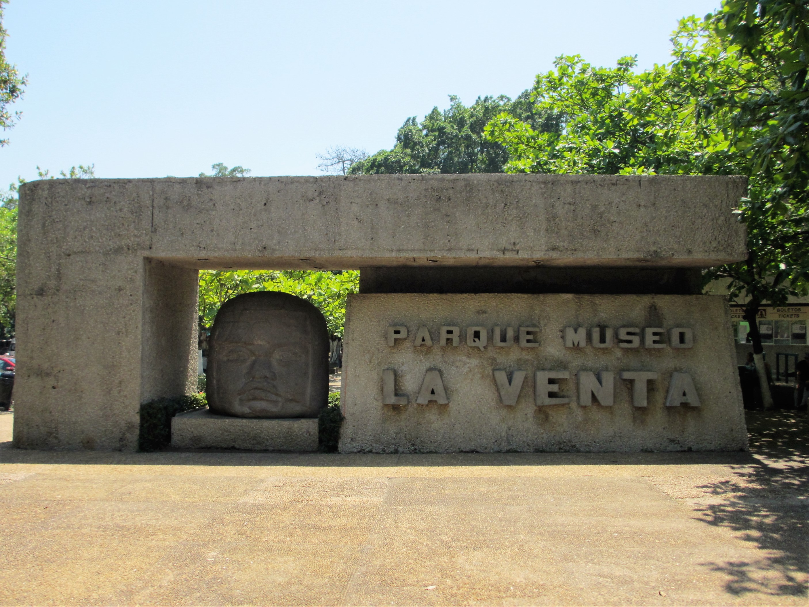 Entrada al Parque Museo La Venta, en la ciudad de Villahermosa, Tabasco, México.